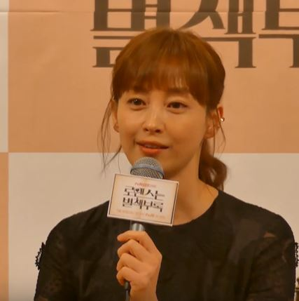 21일 오후 서울시 강남구에 위치한 임피리얼펠리스 서울 호텔에서 tvN 새 토일 드라마 '로맨스는 별책부록' 제작발표회가 열렸다. 이날 배우 이종석, 이나영, 정유진, 김태우, 위하준, 김유미가 참석해 드라마 소개와 배역 캐릭터를 소개하고 있다. 한편, tvN 새 토일 드라마 '로맨스는 별책부록'는 오늘 26일 오후 9시 첫 방송된다.